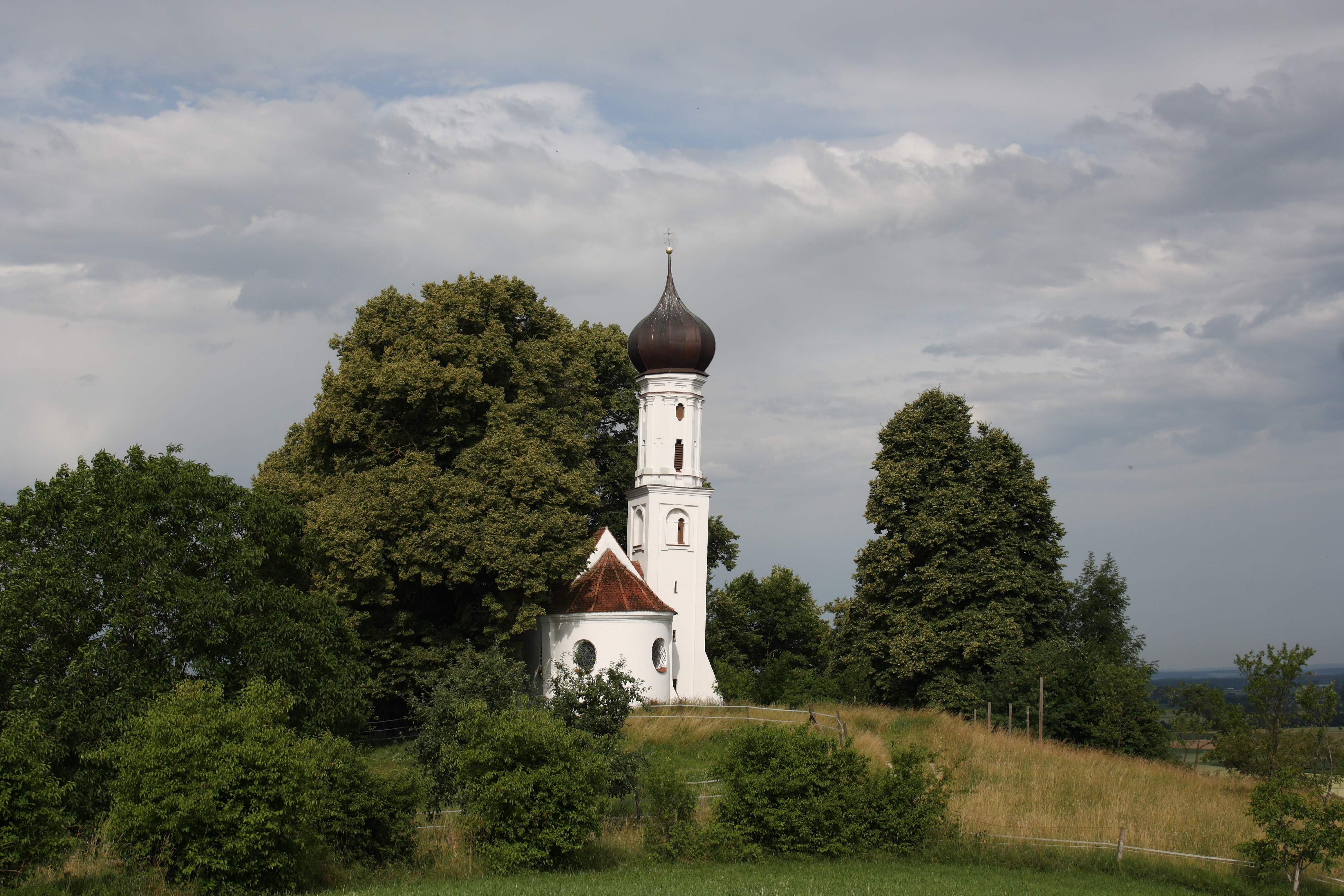 Katholische Kapelle St. Sebastian in Holzheim im Landkreis Dillingen an der Donau (Bayern), 1716 im Burgstallgelände auf dem Sebastiansberg errichtet